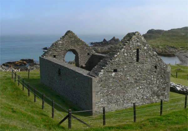 St Ninian's Chapel, Whithorn, Scotland